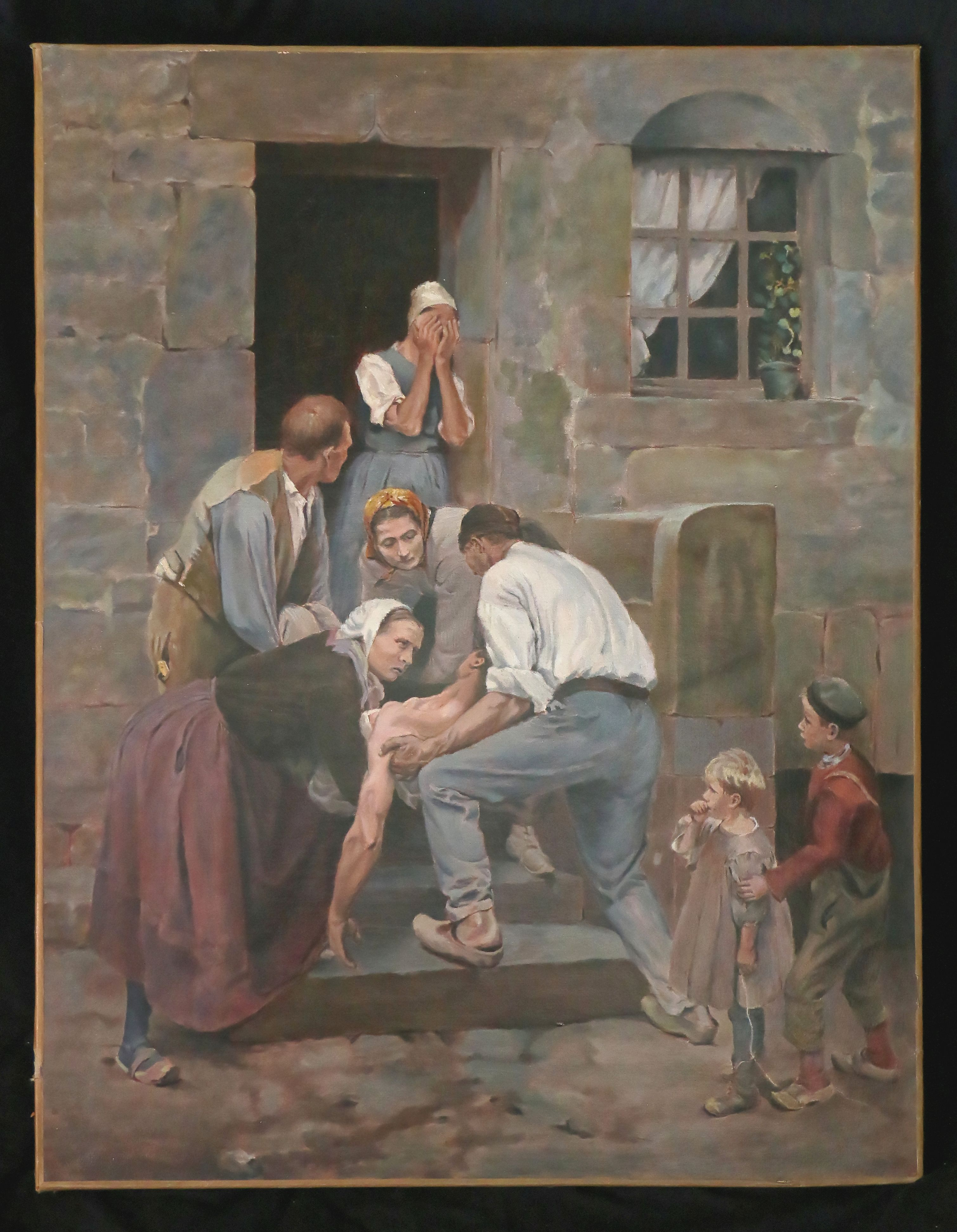 André Brouillet (1857-1914). Huile sur toile, 56 x 72 cm (1/4 de l'original). Collection particulière. Le tableau du Salon, conservé au Musée des Beaux-Arts de Grenoble, a été légèrement tronqué en haut et en bas par rapport à ce tableau, sans doute pour s'adapter à un cadre existant.